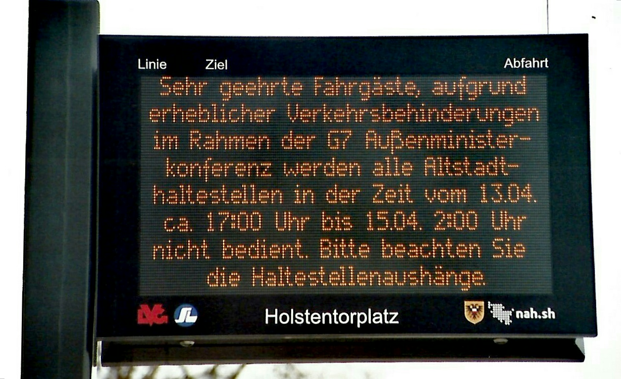 Mitteilung des Lübeckischen ÖNV